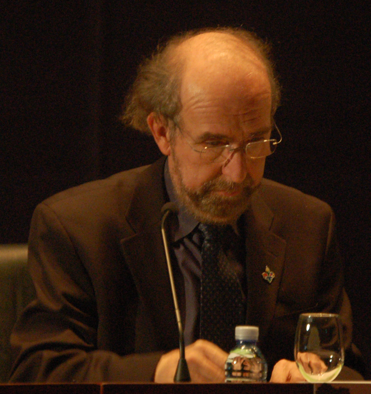 Gérald Larose, sindicalista de Québec